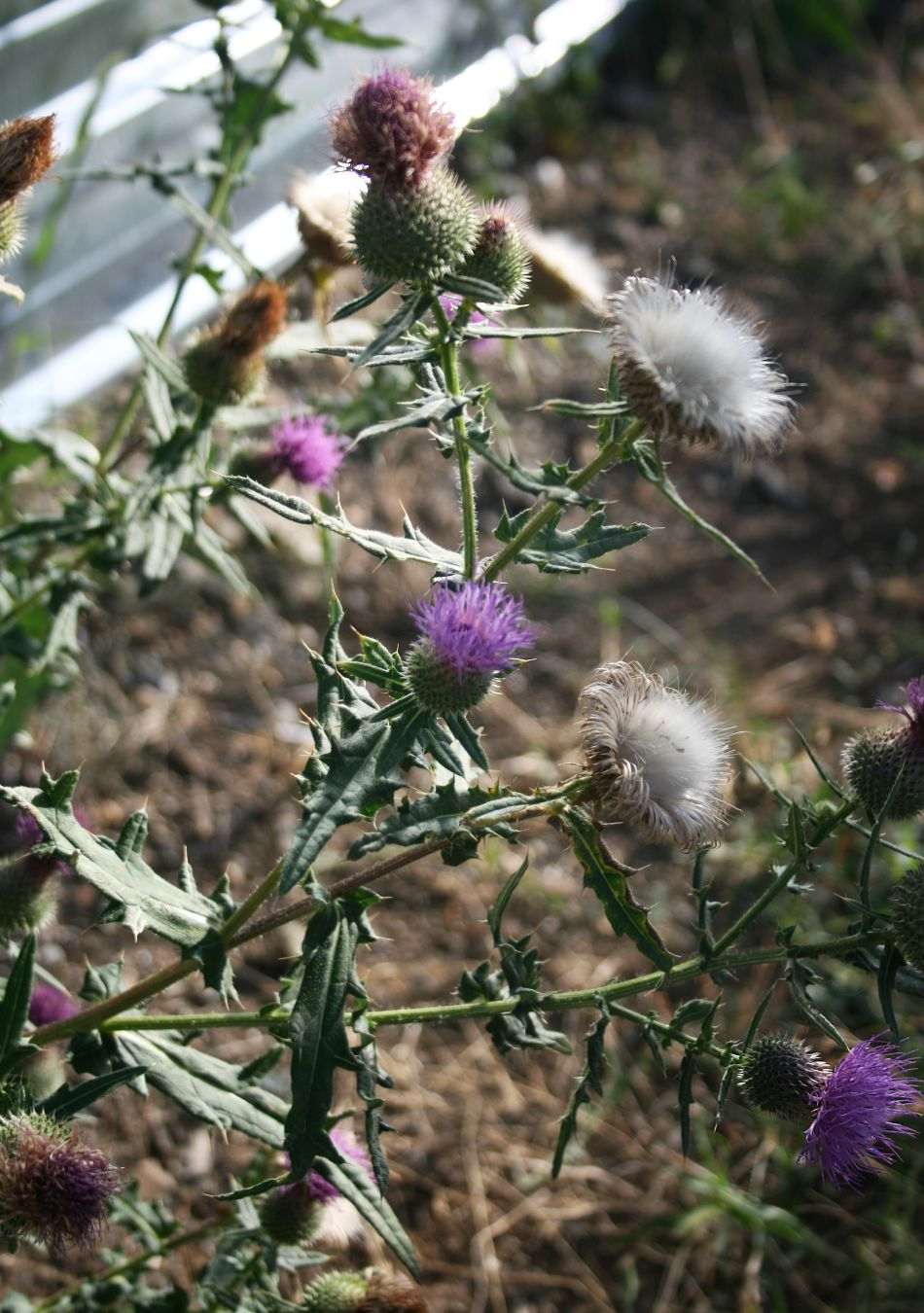 Cirsium ciliatum subsp. ciliatum, Korbblütler (Asteraceae) – Georgien/საქართველო: Tbilissi/თბილისი, Sololaki